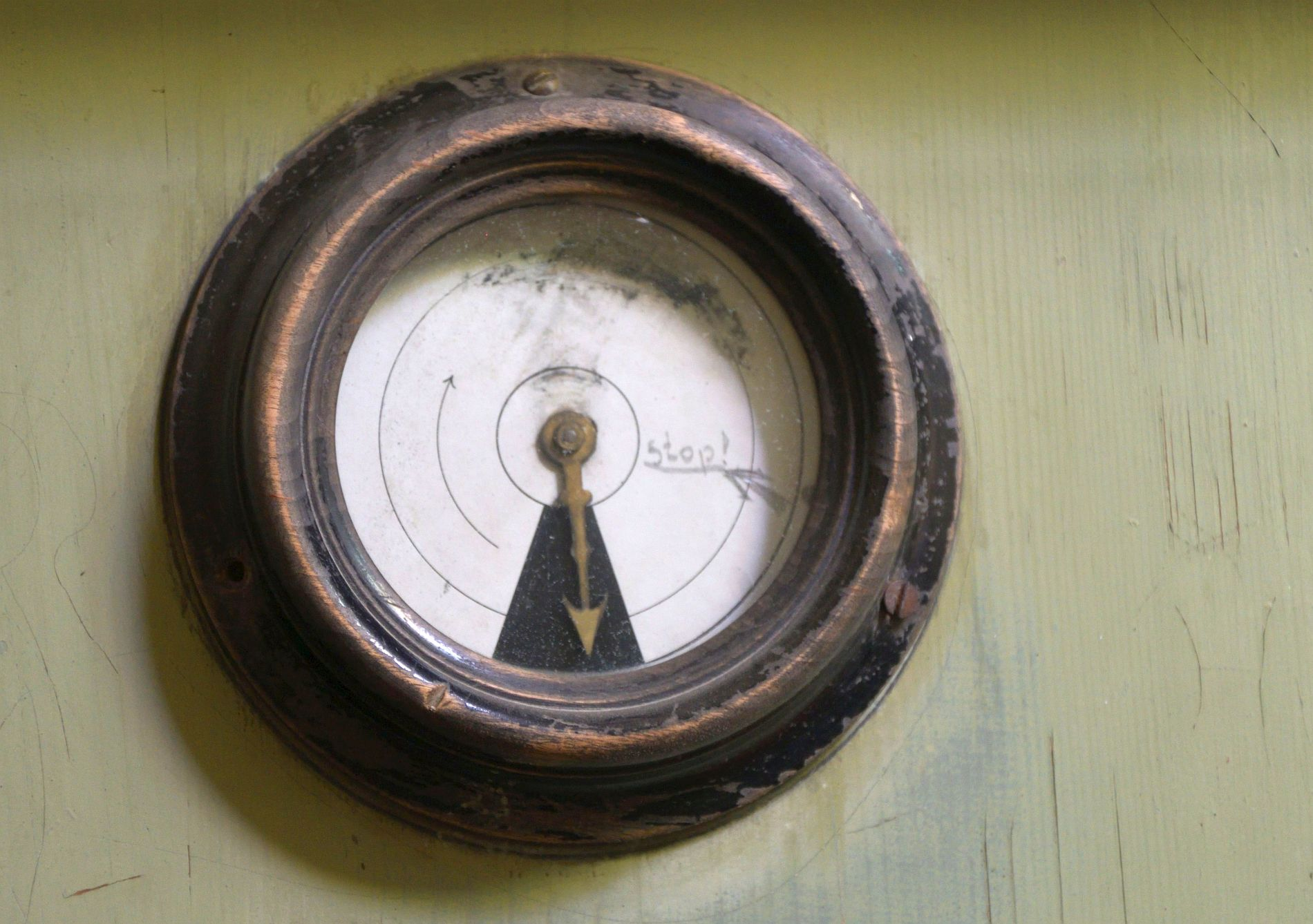 wskaźnik poziomu powietrza z ok. 1920 roku